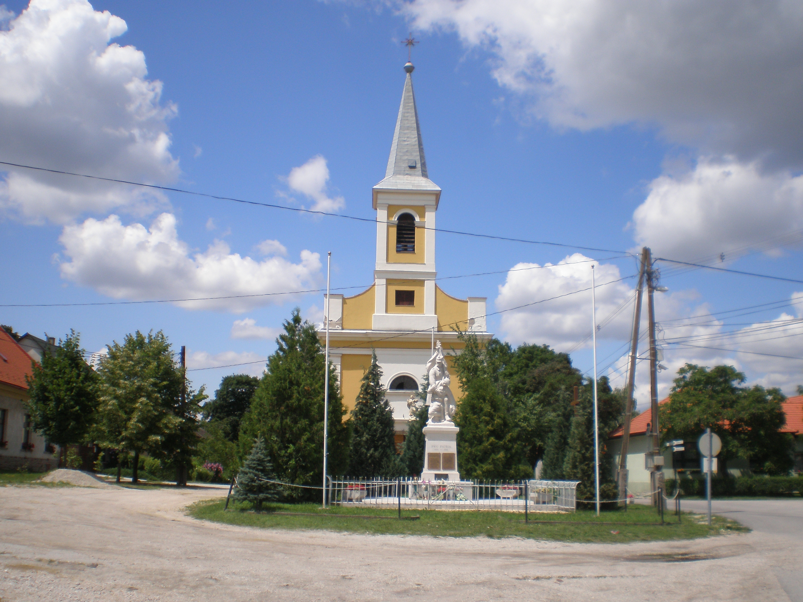 A templom. Abda, Hungary This is a photo of a monument in Hungary, Identifier: 3977